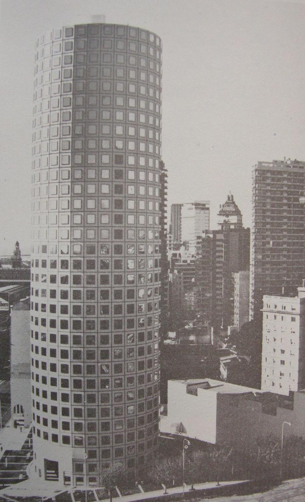 Vista aérea desde el noroeste de la torre Edificio Conurban en las avenidas 9 de Julio y del Libertador. Buenos Aires, Argentina.